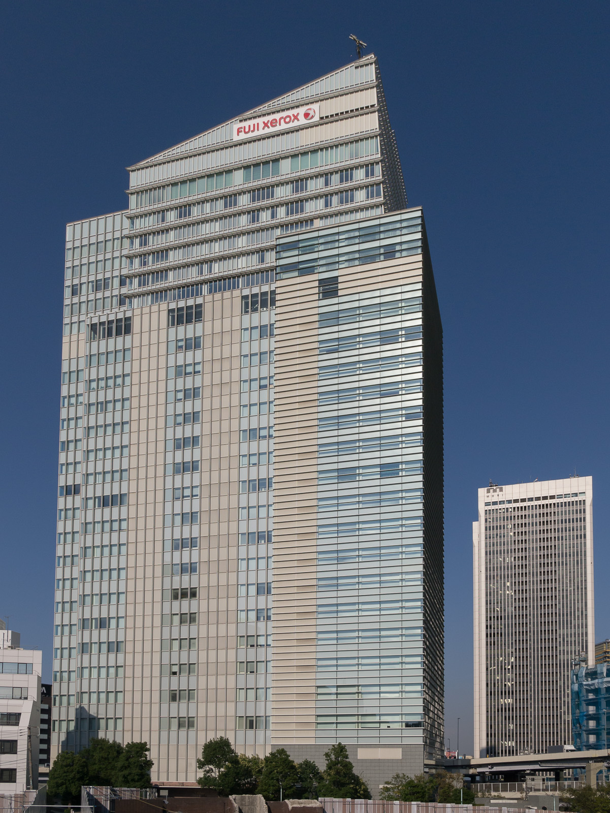 六本木T-Cube、東京都港区六本木3-1-1。